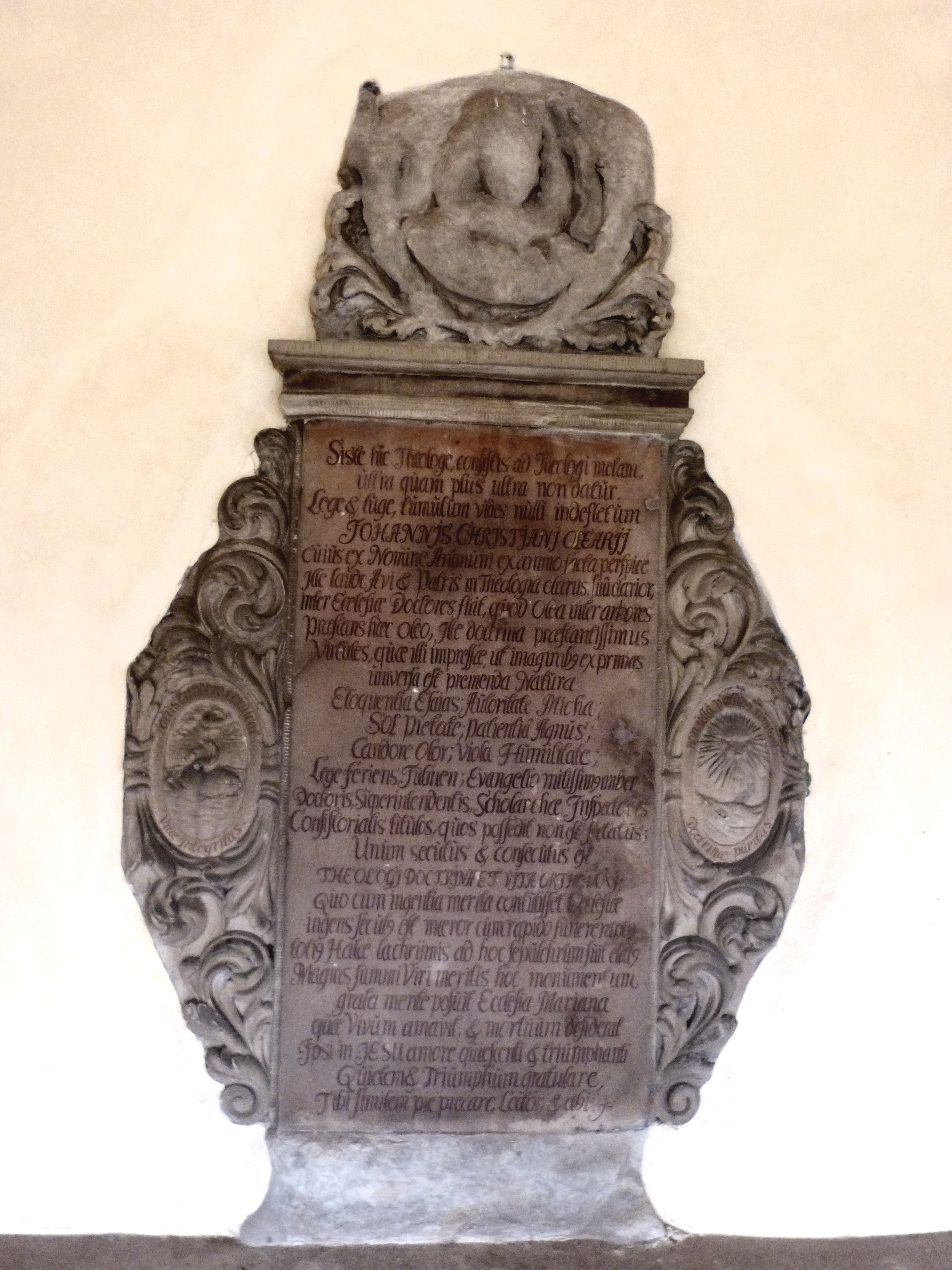 Epitaph für Johann Christian Olearius im Grabbogen 8 des Stadtgottesackers Halle